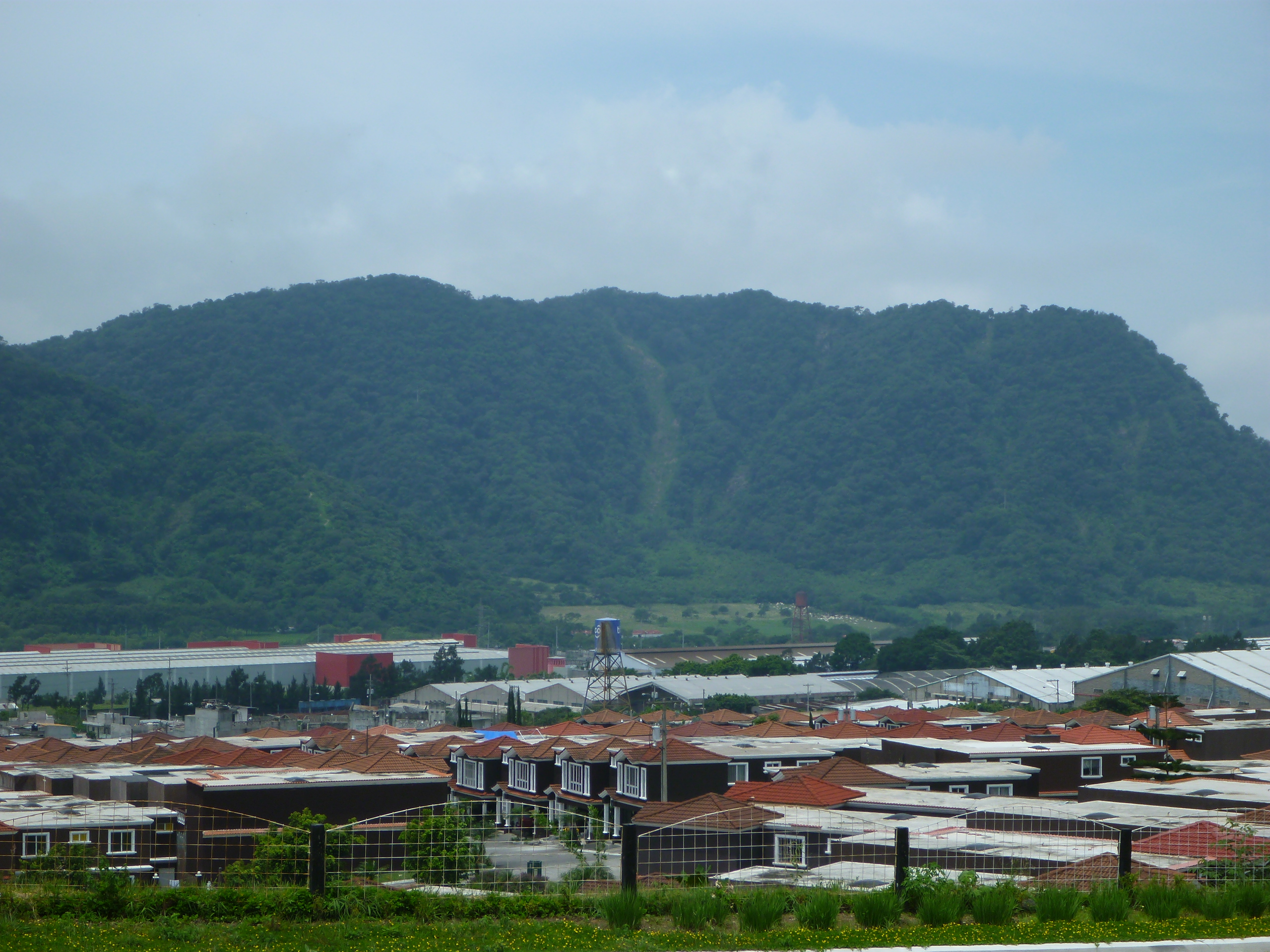 Palin, Guatemala